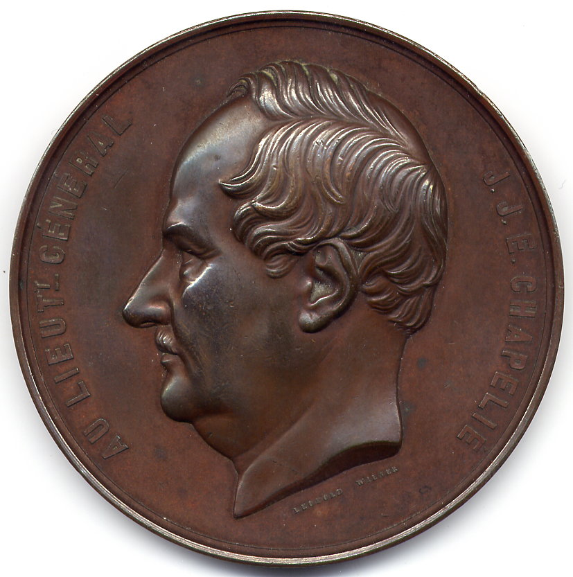 Médaille du général Jean Chapelié fondateur de l'Ecole Militaire de Bruxelles.